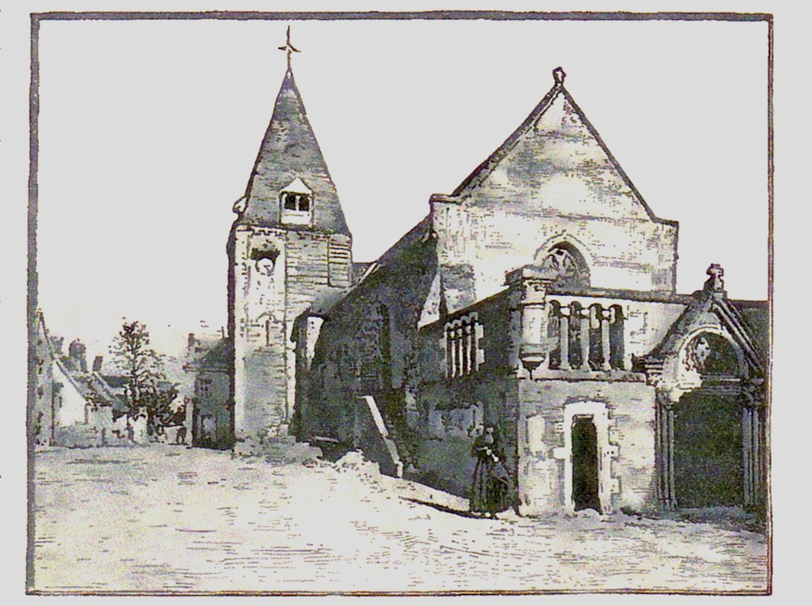 Eglise de Limeray vers 1900 - Indre et Loire - France